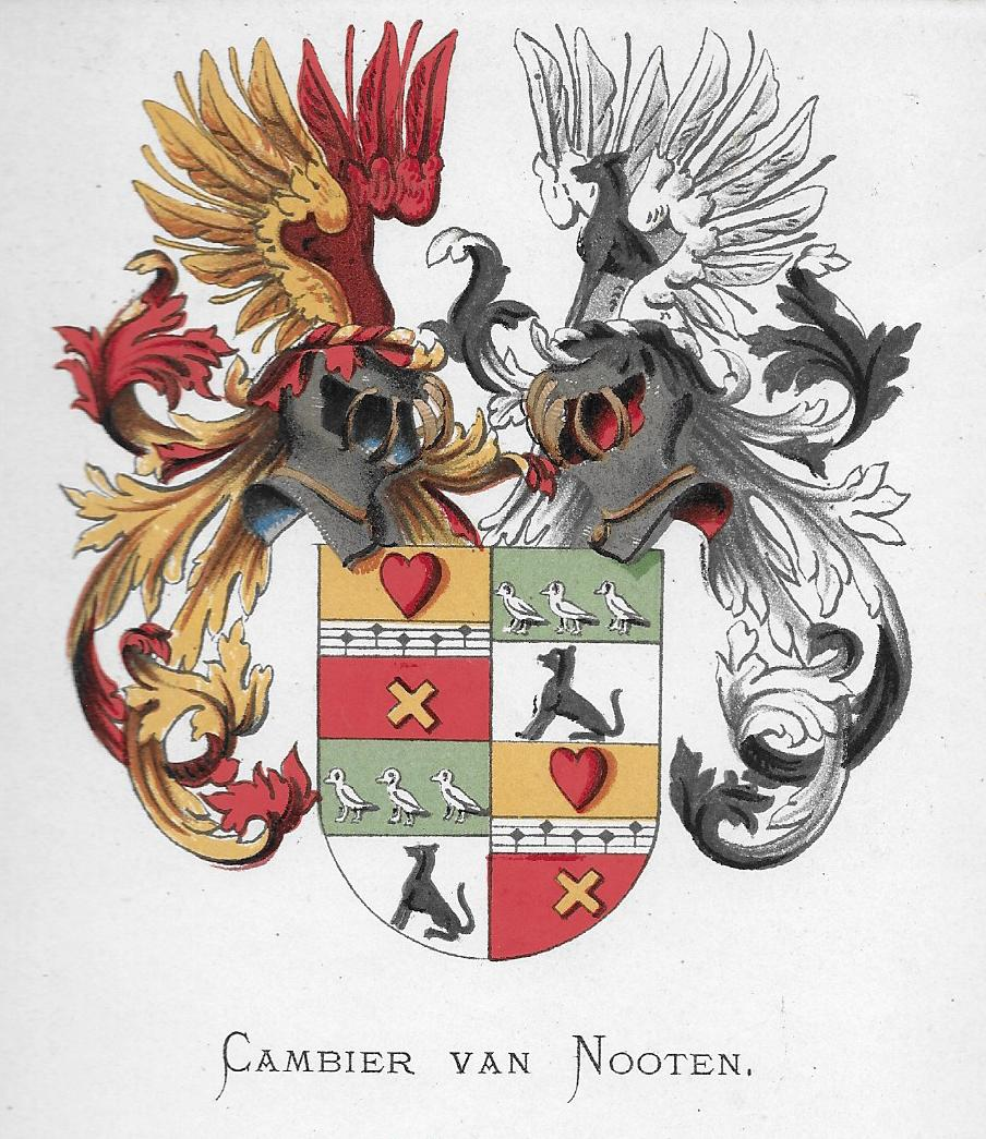 Armes écartelées de la famille hollandaise Cambier van Nooten